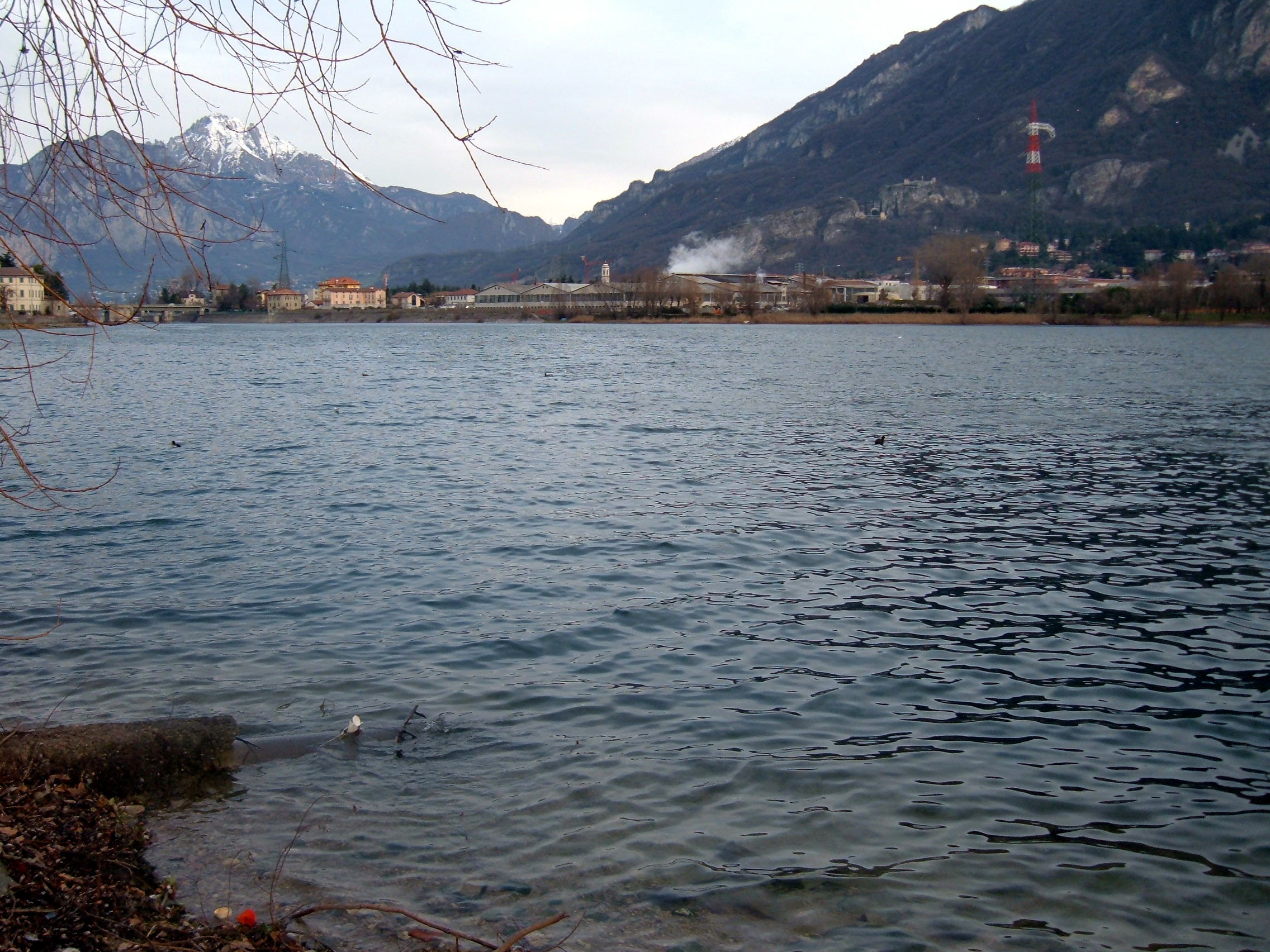 Lago di Olginate